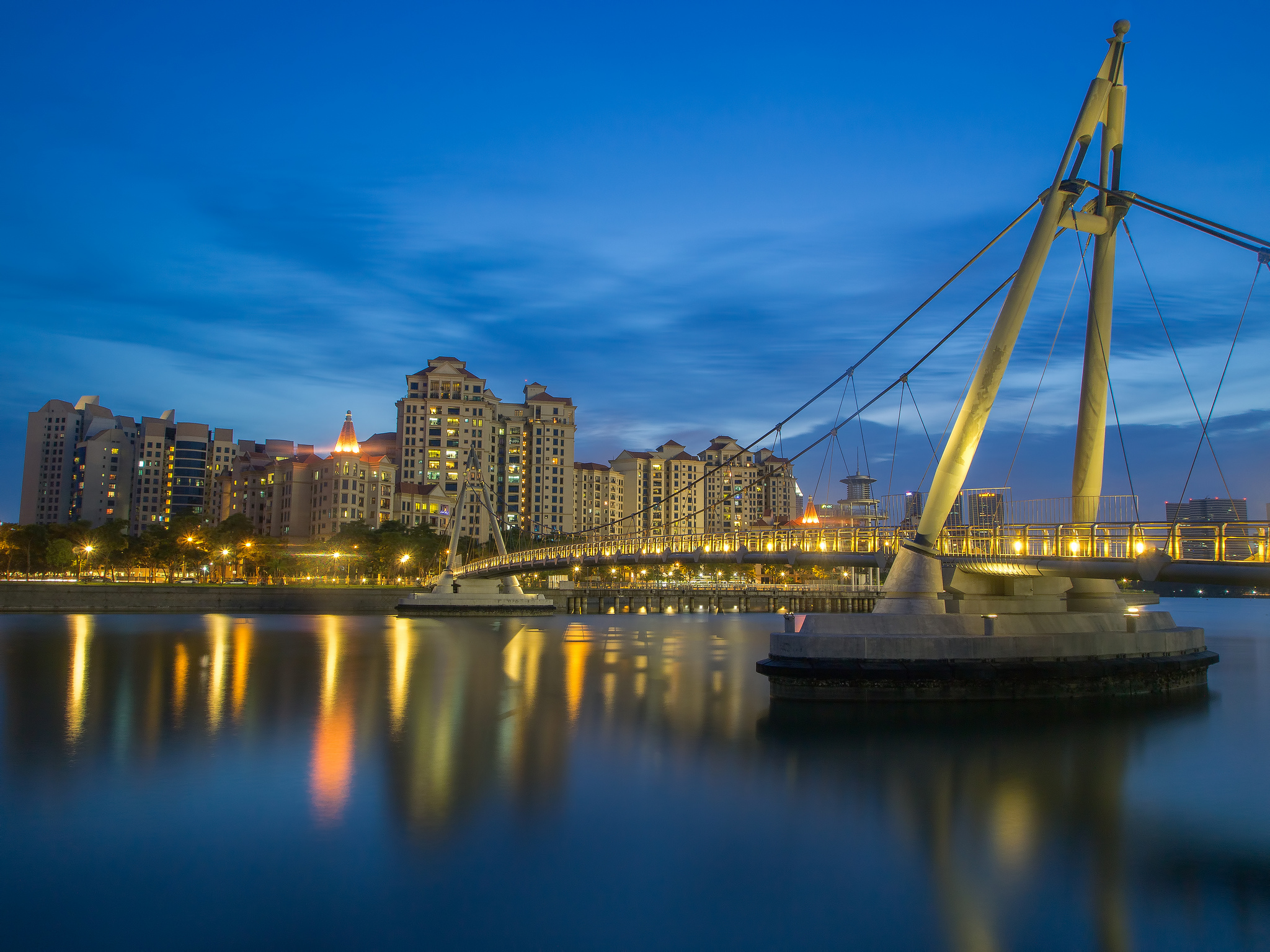 Tanjong Rhu Bridge, Singapore